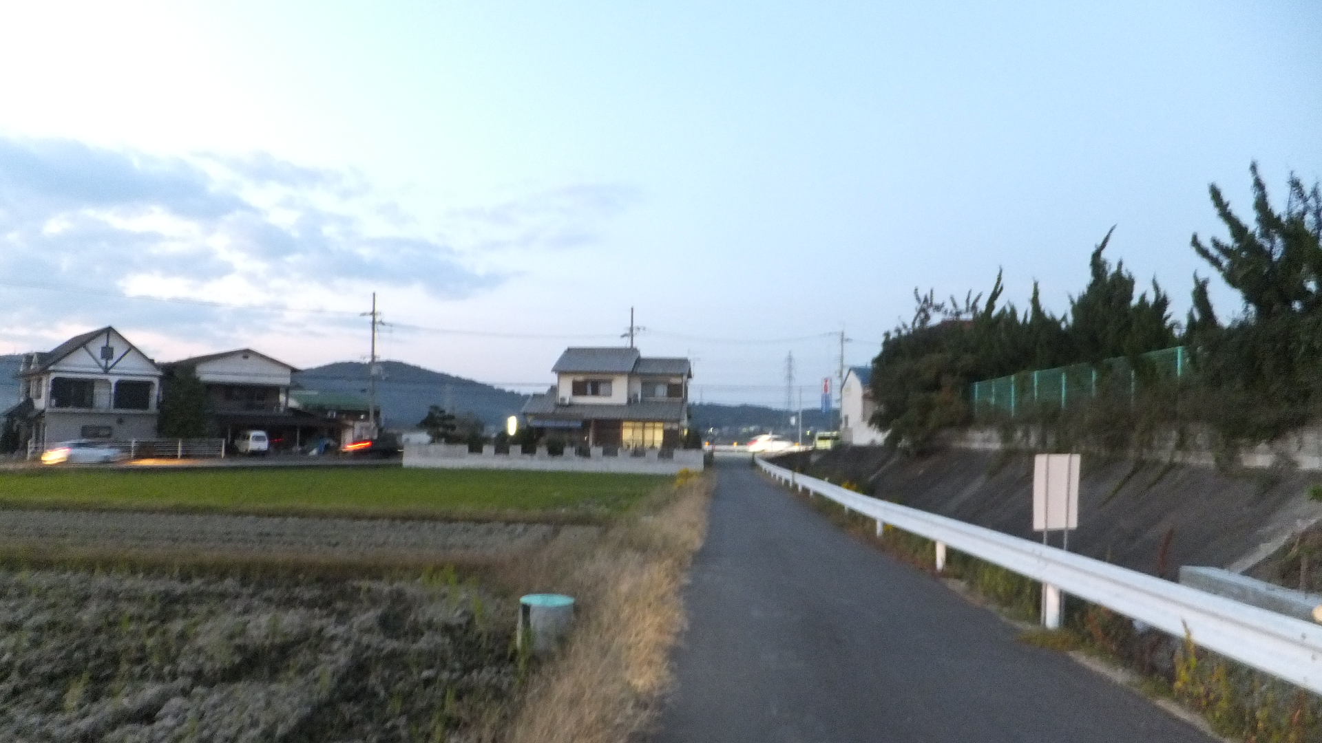 兵庫県三木市別所町西這田